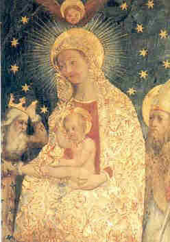 Santa Maria Bianca. Affresco di fra' Pietro da Napoli (sec. XIV). Parma, Chiesa di Santa Maria Bianca.